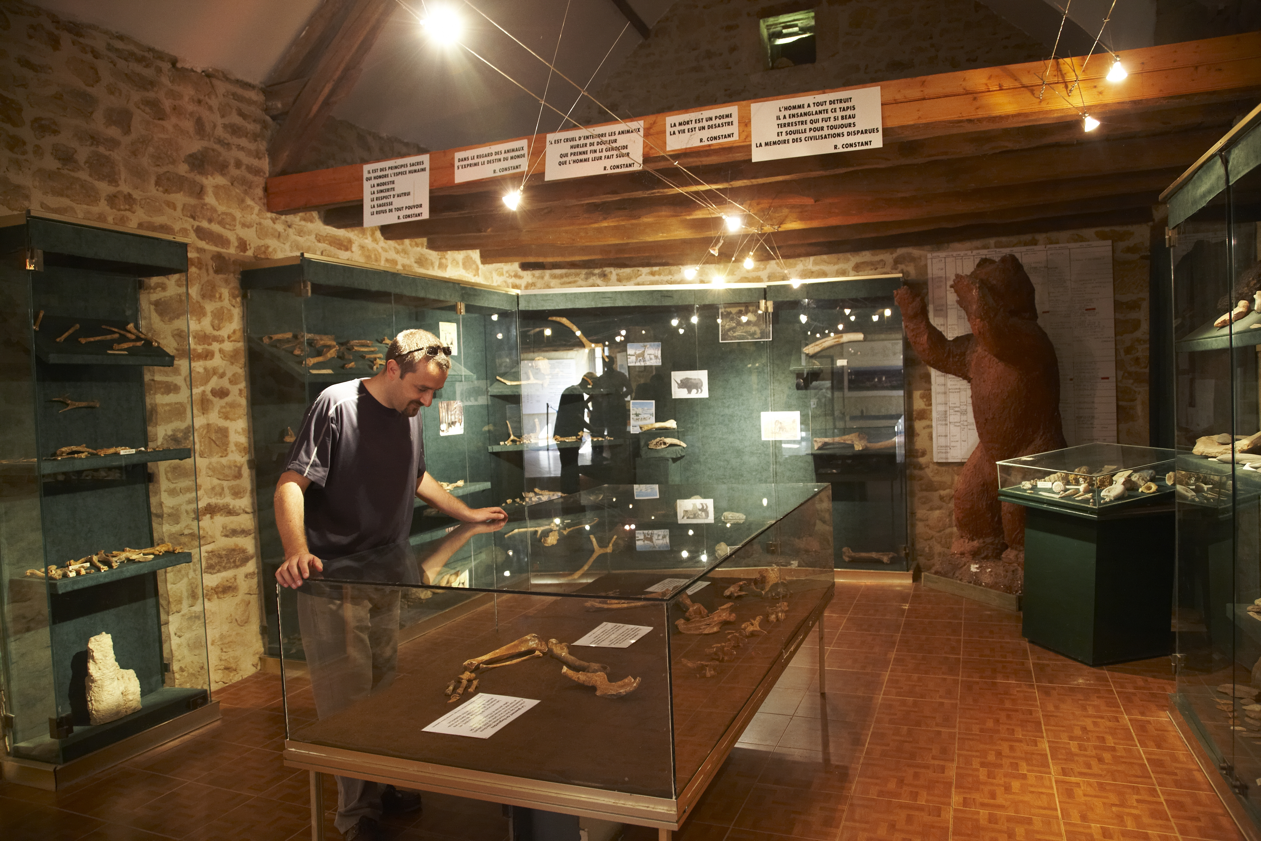 Exposition des artefacts trouvés au Régourdou